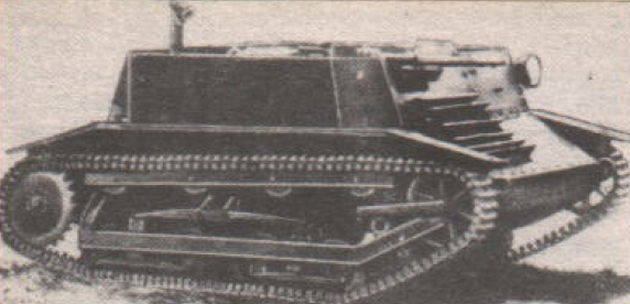 Alternatywna odmiana, prototyp TK-2. Zawieszenie podobne do poprzedniego wozu, jednak koła napędowe przeniesione na tył kadłuba; silnik Forda mocy 40 KM, skrzynia przekładniowa również fordowska. Numer rejestracyjny prawdopodobnie 6008 TK. Podobnie jak poprzedni model, i ten czołg nie miał stałego opancerzenia przedziału bojowego od góry. [opis oryginalny]. Uwaga: Prawdopodobnie jest to jednak TK-1 (bo on miał taki silnik i koła napędowe z tyłu). Magnuski się chyba pomylił przy opisie [Za A. Jońca: Tankietki TK-3 i TKS; wyd. 2013].